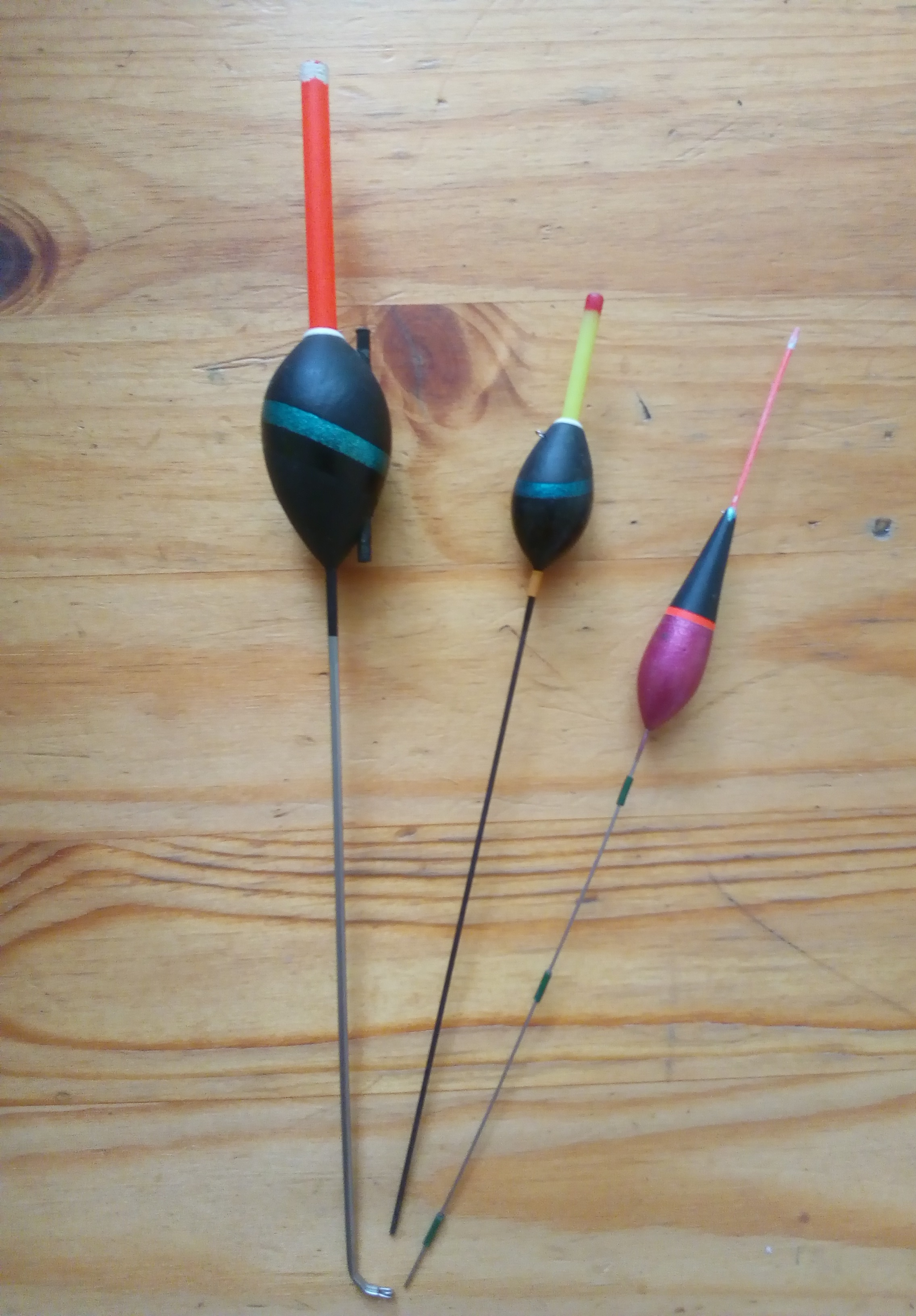 Поплавки для болонской удочки